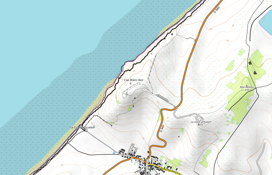 carte réalisée sur umap This map may be incomplete, and may contain errors. Don't rely solely on it for navigation.